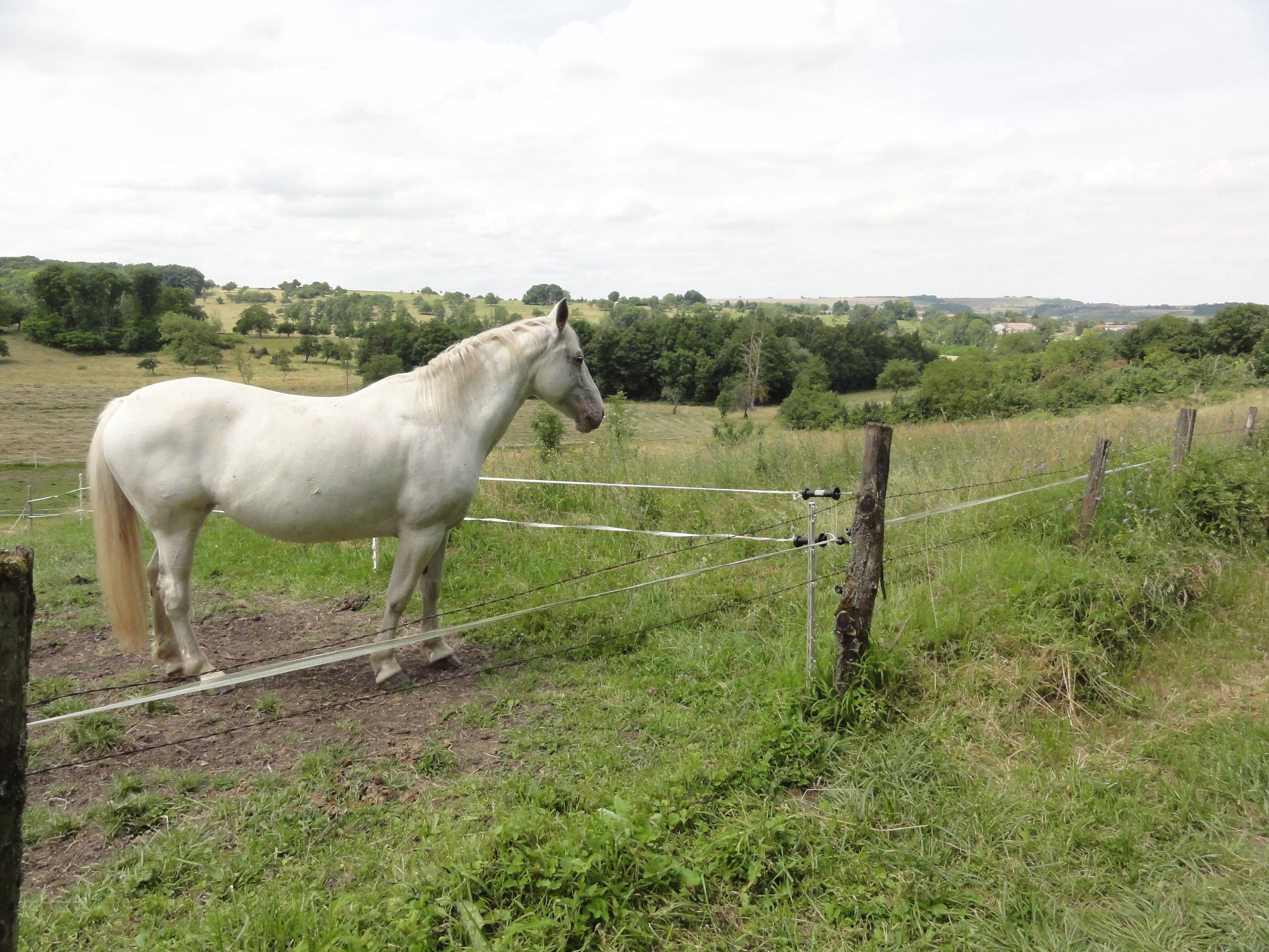 Villacourt (M-et-M) paysage avec cheval blanc